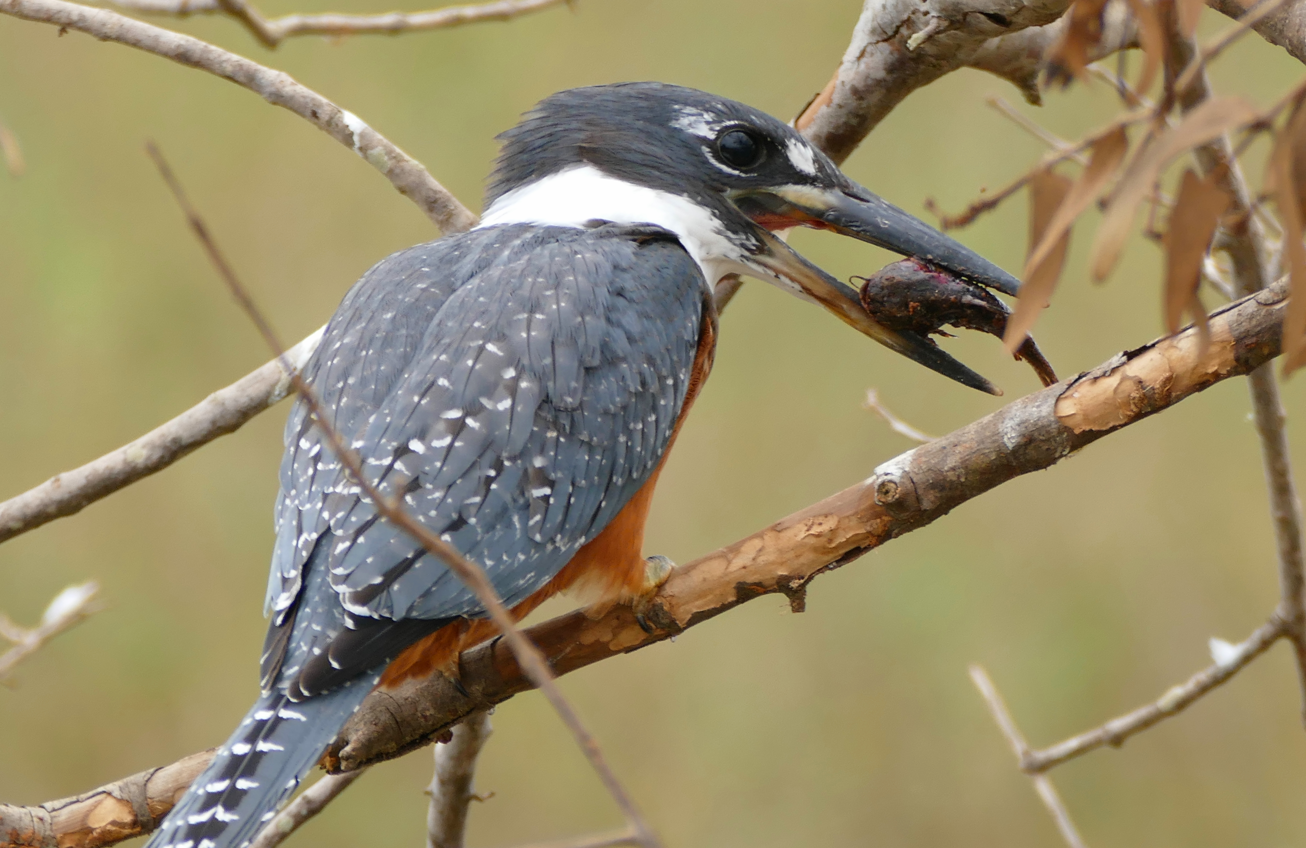 Transpantaneira, Poconé, Mato Grosso, BRAZIL